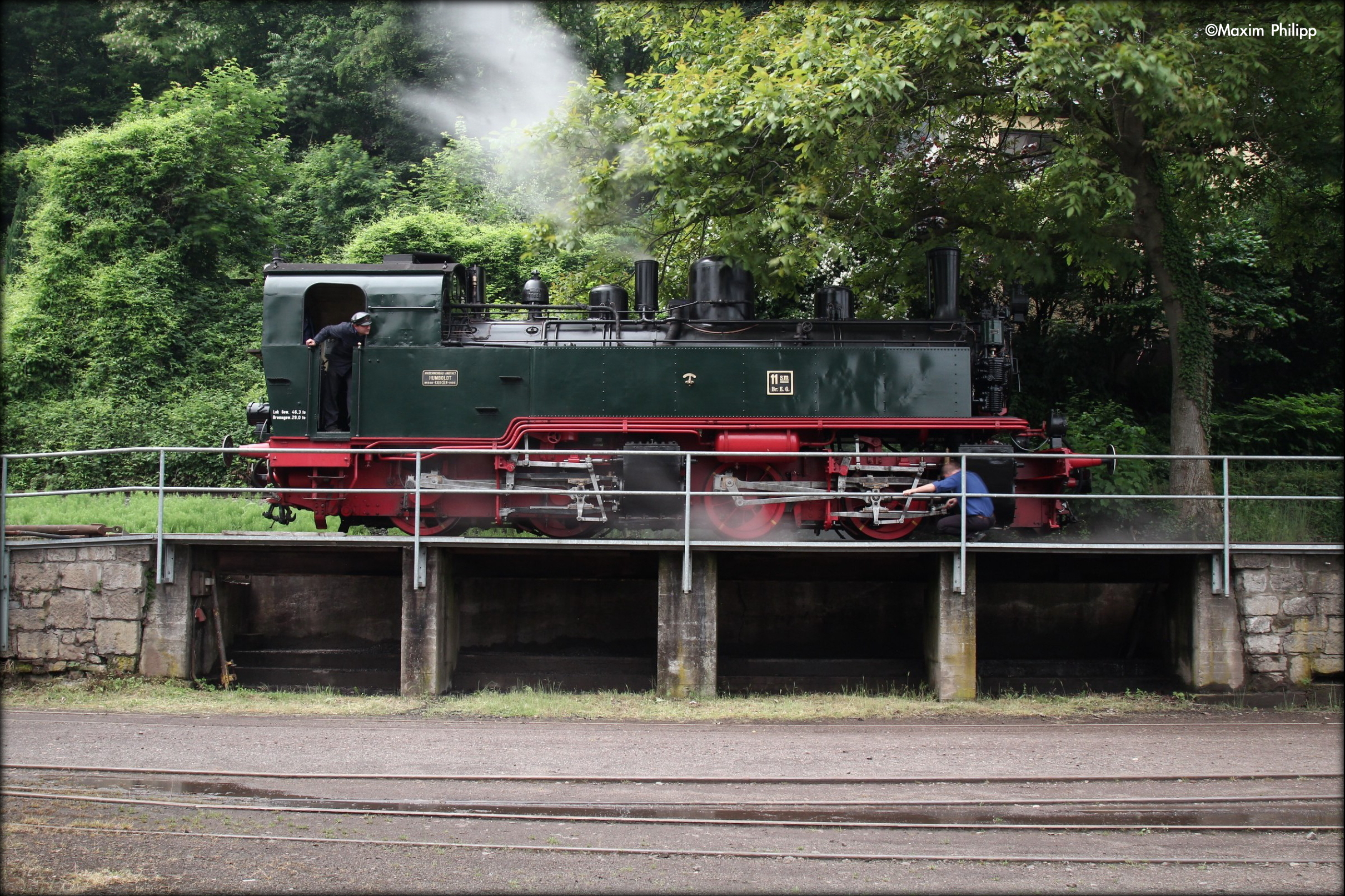 11sm der Brohltalbahn / Vulkan-Expreß in Brohl-Lützing. Juni 2016.